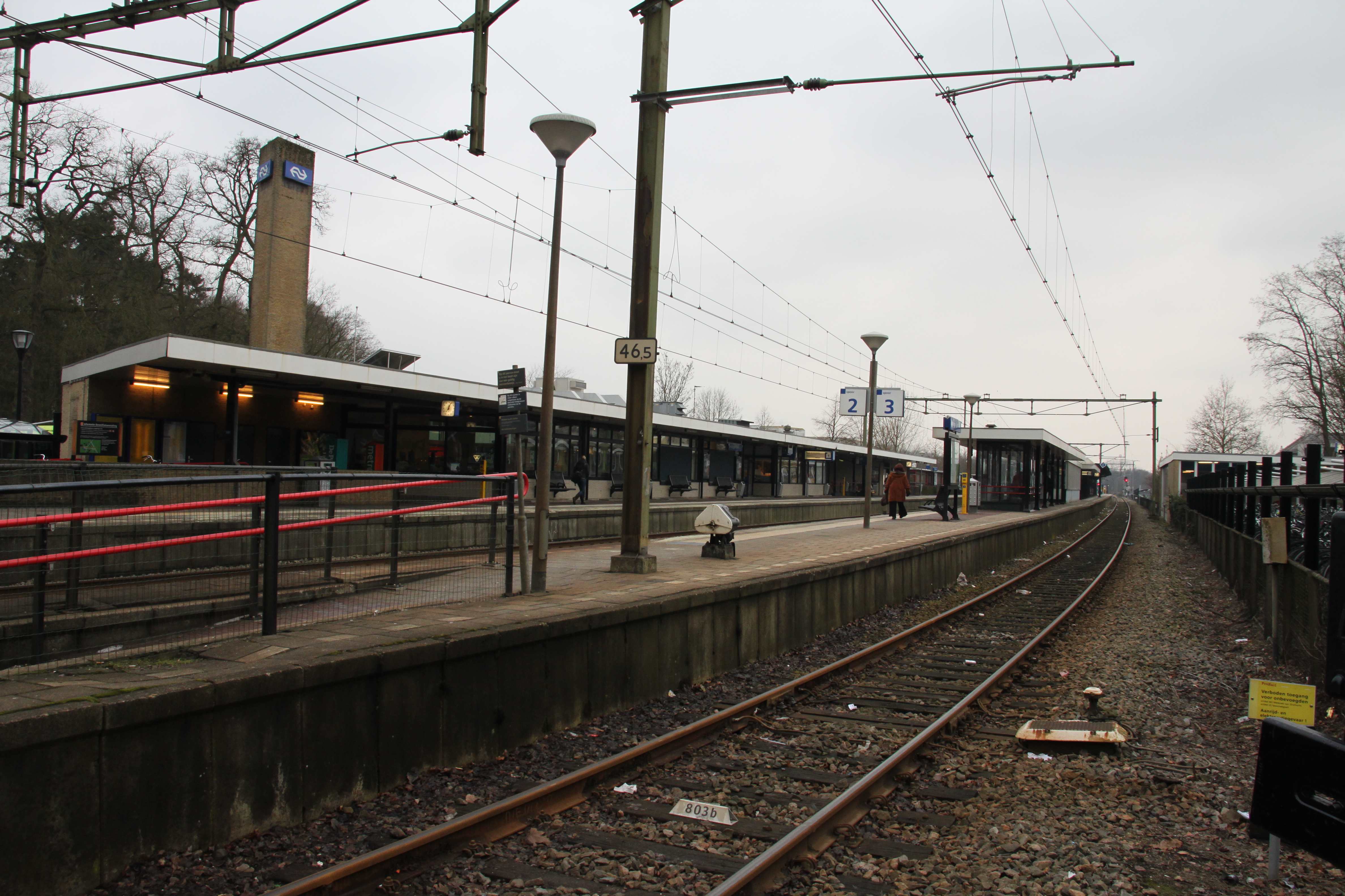 Perrons van station Driebergen-Zeist.